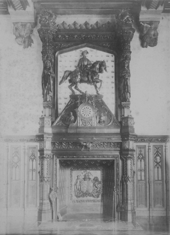 Carte postale ancienne illustrant la cheminée du grand salon du château de Challain, Maine-et-Loire, France.